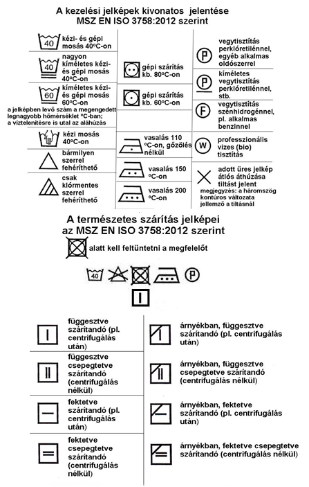 Példák a textíliák kezelési jelképeinek alkalmazására